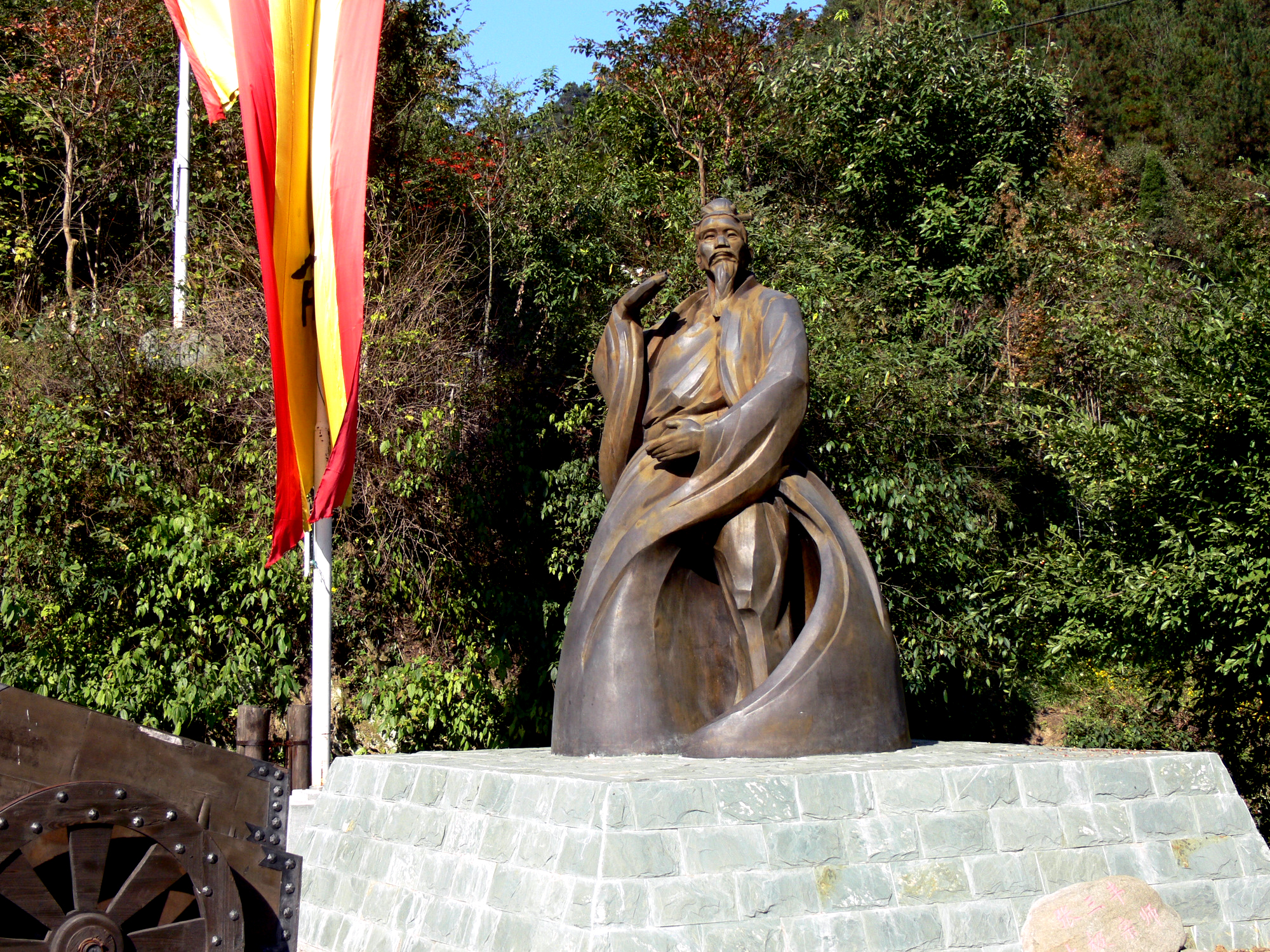 武当山逍遥谷太极张三丰塑像 Statue of Zhang Sanfeng at Wudang Mountain